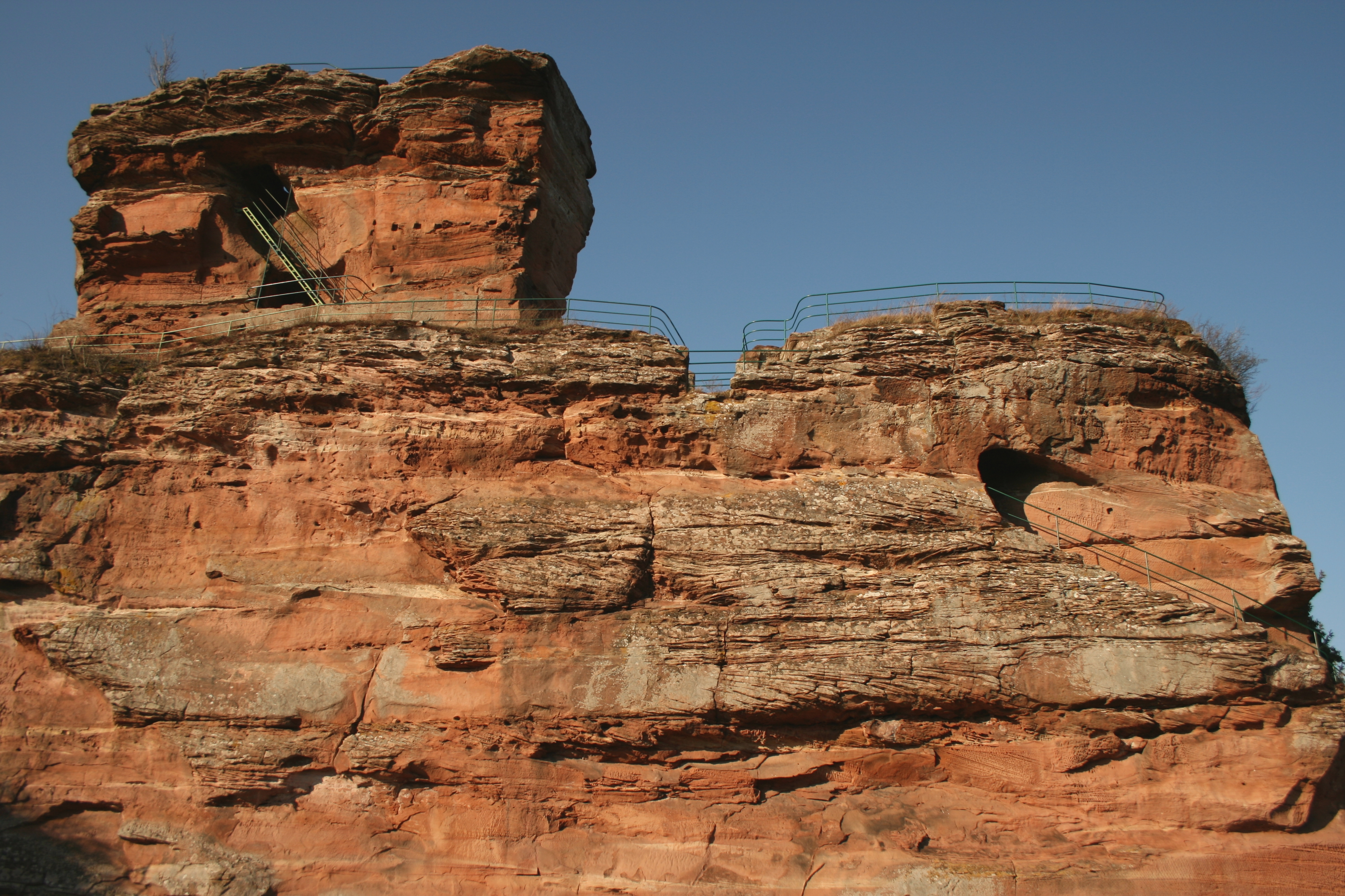 Burg Drachenfels bei Busenberg , Wasgau, Pfälzer Wald. Ansicht des östlichen Burgfelsen von Süden, Standort Vorburg.